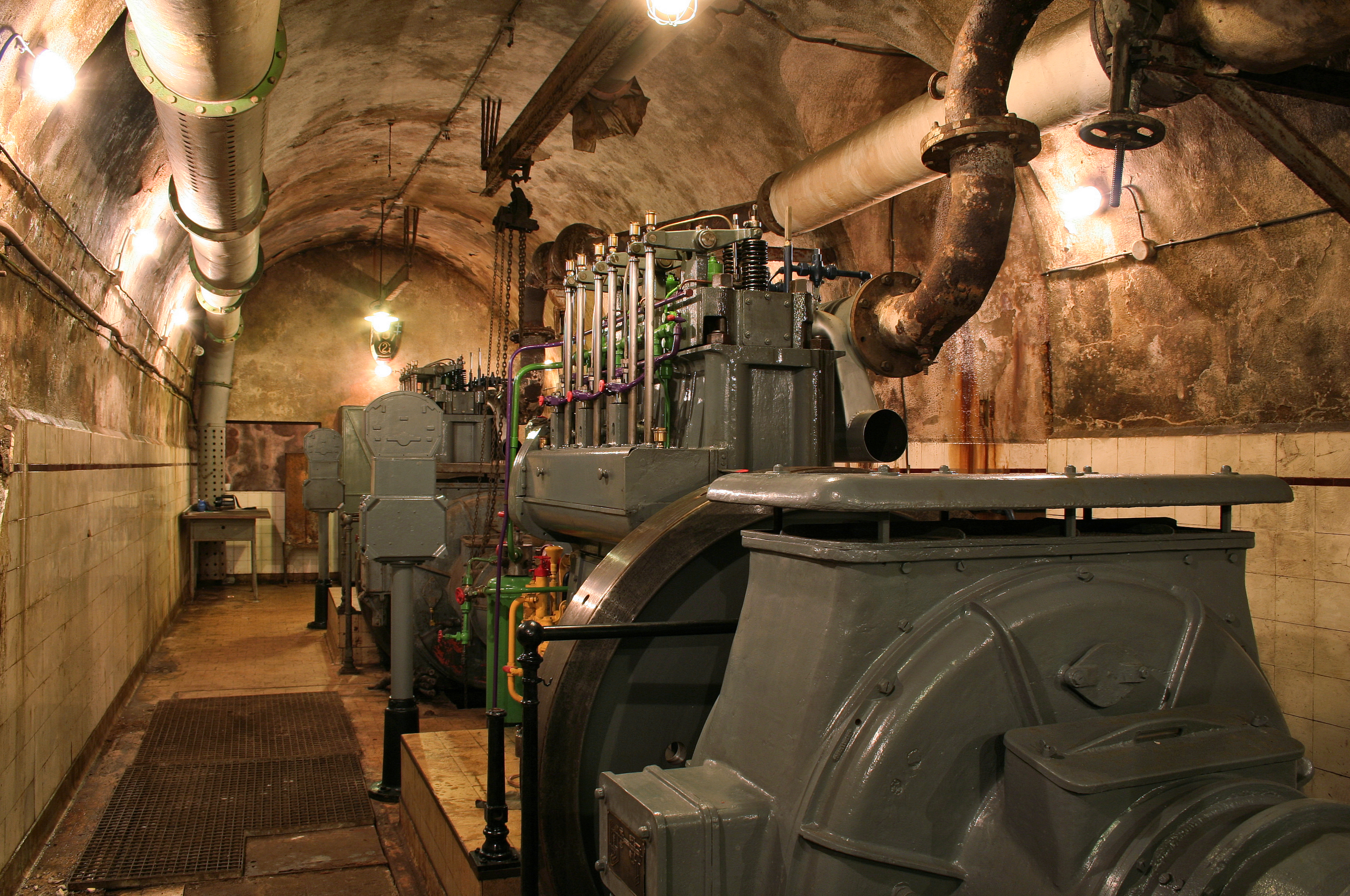 Gros Ouvrage du Michelsberg - Kraftwerk